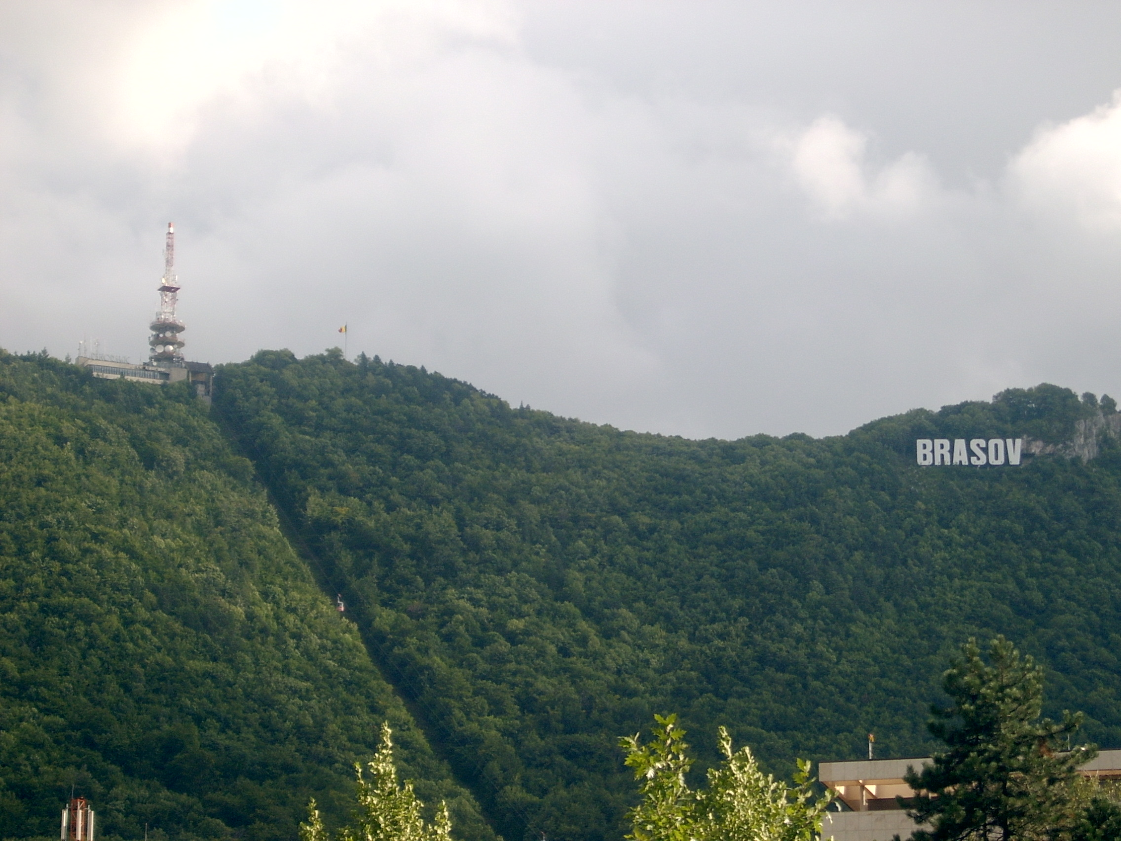 Braşov